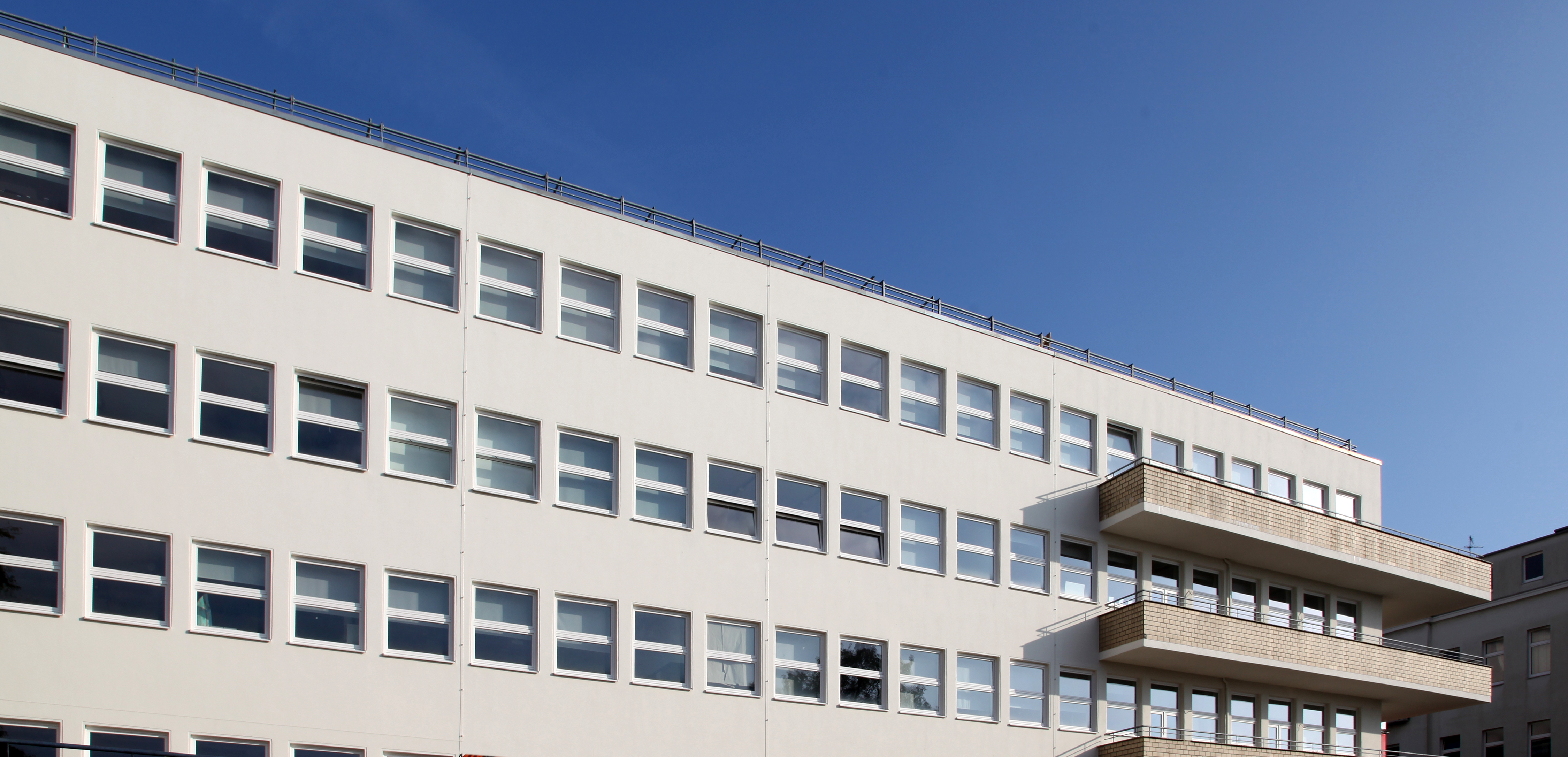 Brand Academy – Hochschule für Design und Kommunikation - Alte Seefahrtschule